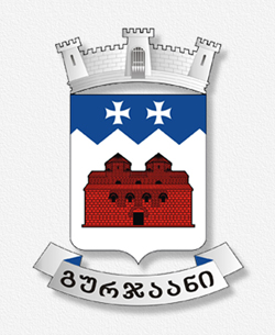 გურჯაანის მუნიციპალიტეტის გერბი